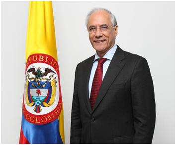 El Ministro de Minas y Energía Carlos Rodado.